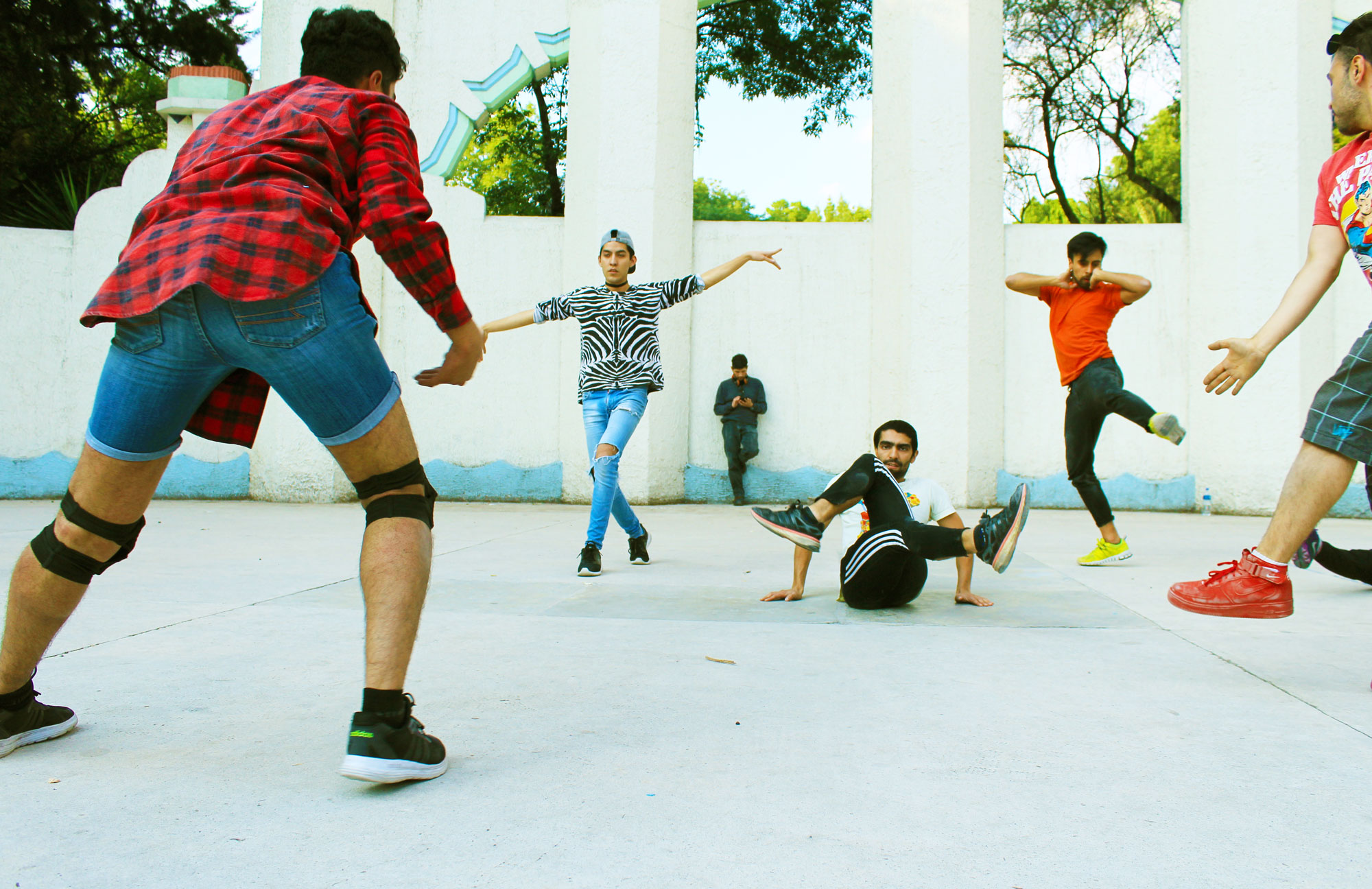 Voguing CDMX